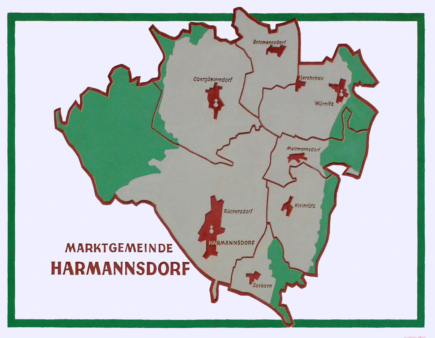 Gemeinde Harmannsdorf, Fotografiert